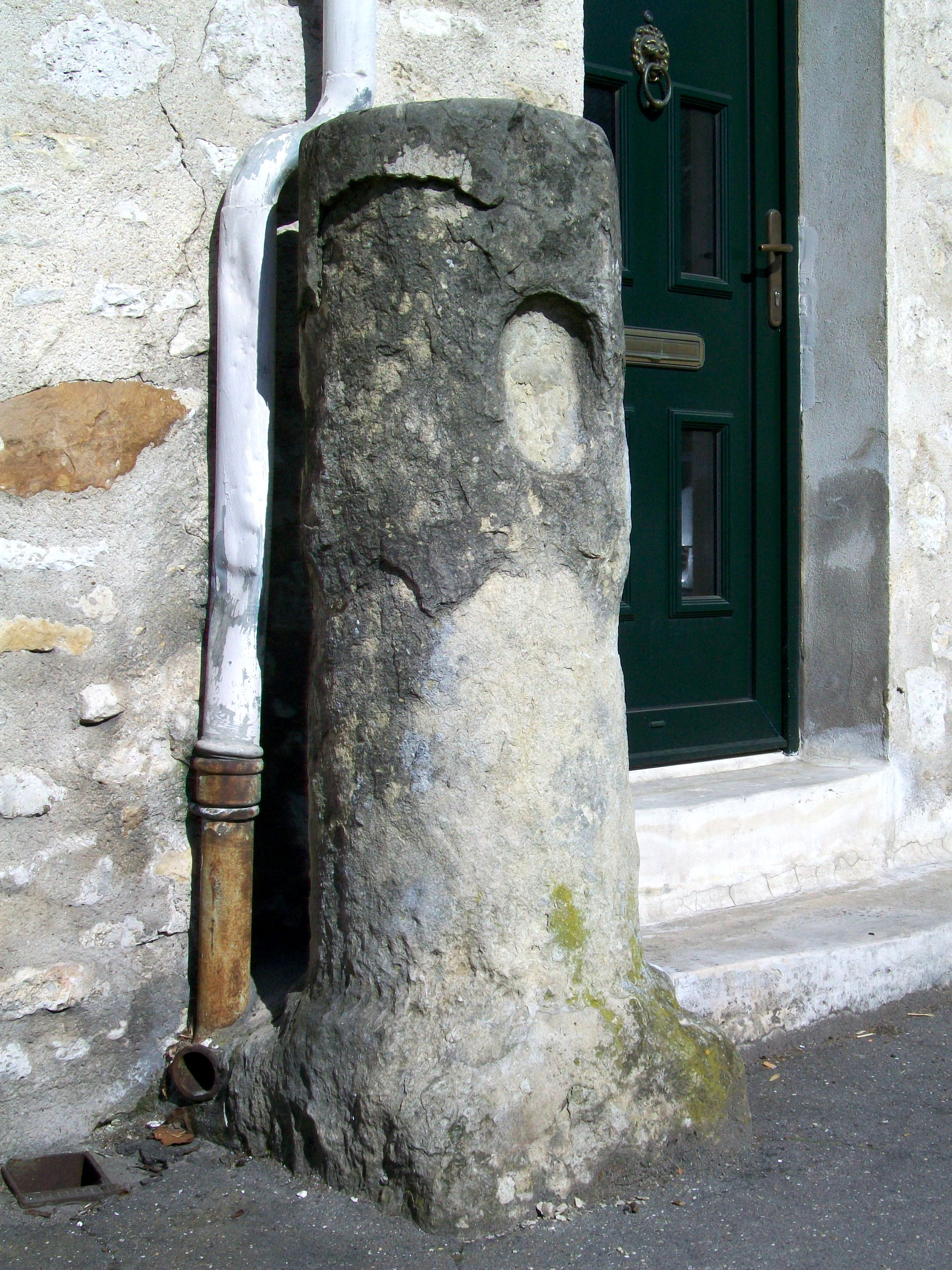 Vieille borne sur la rue du faubourg Saint-Martin, la route de Paris. Cette borne portait une fleur de lys et date de l'Ancien Régime.